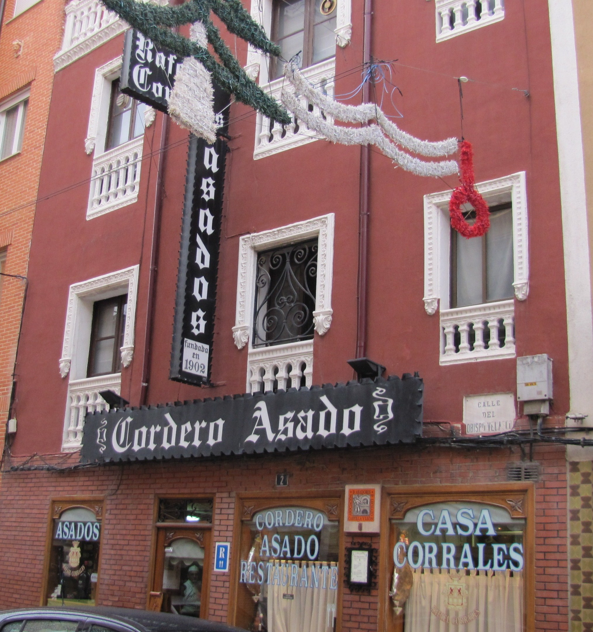 Fachada del Asador Rafael Corrales, en Aranda de Duero (provincia de Burgos, España). El más antiguo de la ciudad, fundado en 1902. La especialidad de los asadores en Aranda es el Lechazo Asado, cordero lechal asado.